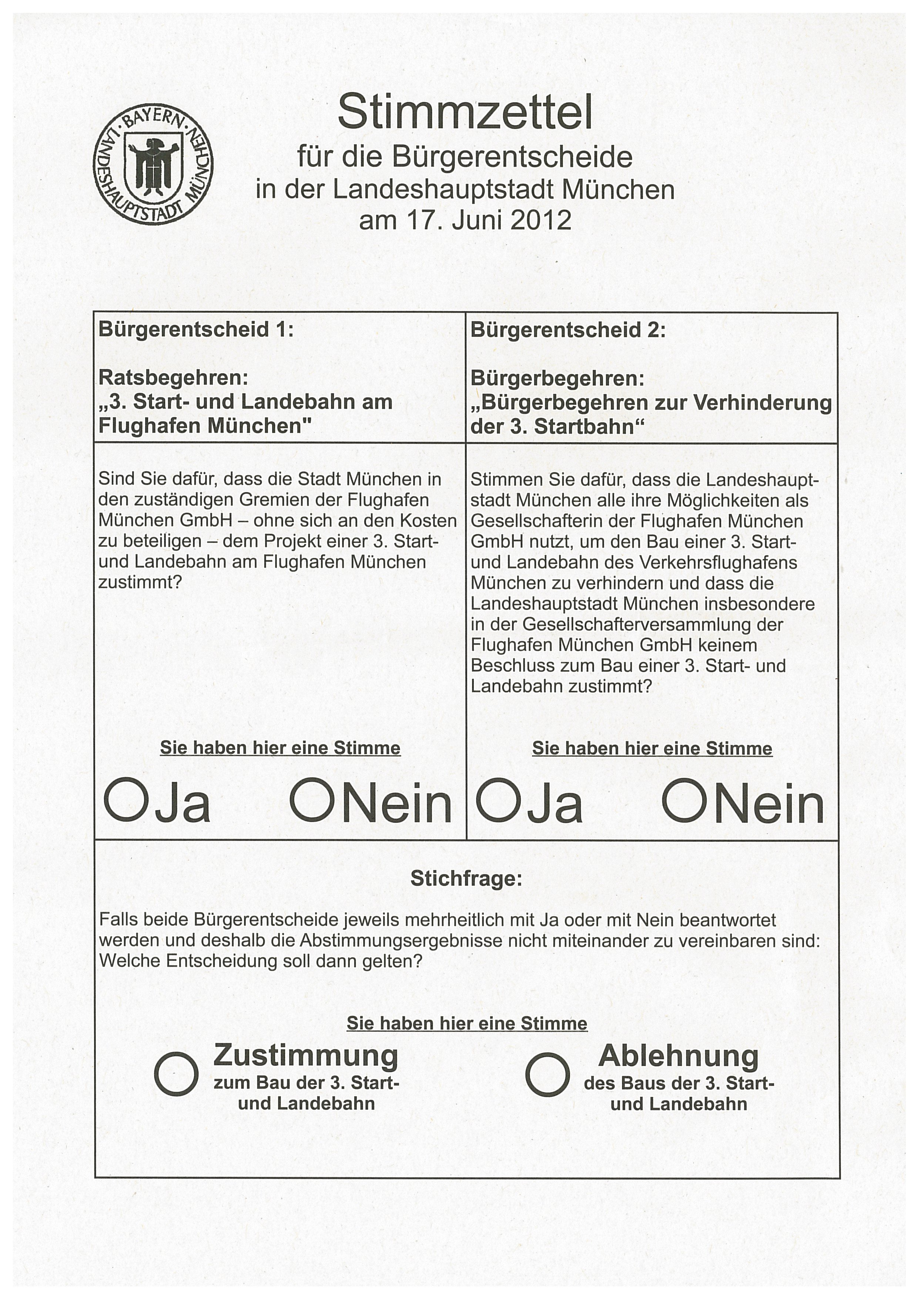 Stimmzettel für die Bürgerentscheide über den Bau einer dritten Startbahn am Flugjafen München am 17. Juni 2012 in München, Oberbayern, Bayern.